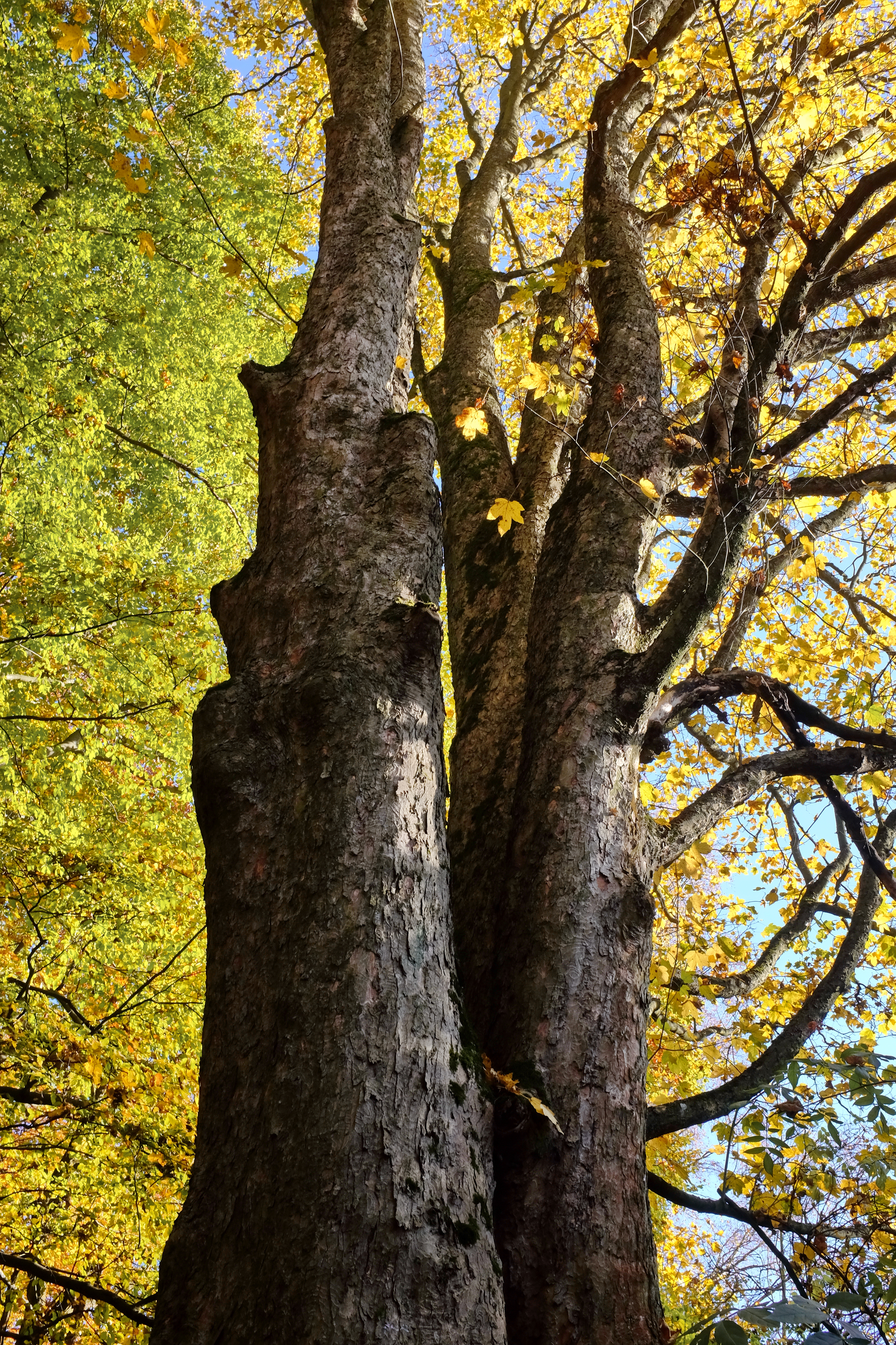 Památný strom - Klenový troják v Hřebenech - Hřebeny (Josefov), okres Sokolov